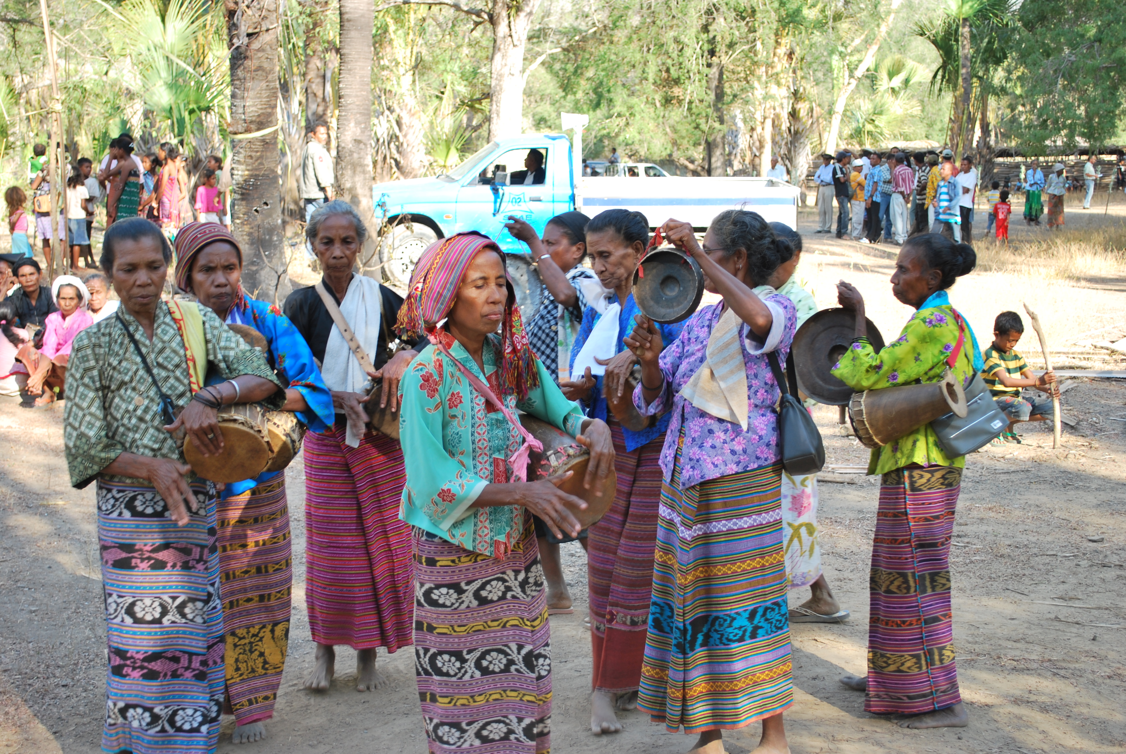 Moradores aus Licore/Laclo